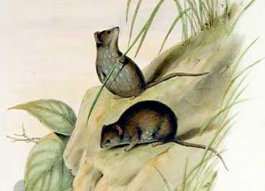 Planigale maculata (orig. Antechinus maculatus)